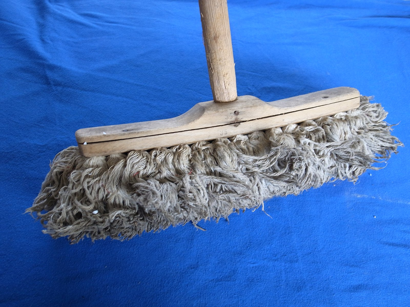 Mopp, (Mop) ca. 1940, Definition im Volksbrockhaus, Ausgabe von 1937: Mop m, ein ölgetränkter weicher Wollbesen zum Säubern gebohnerter Fußböden